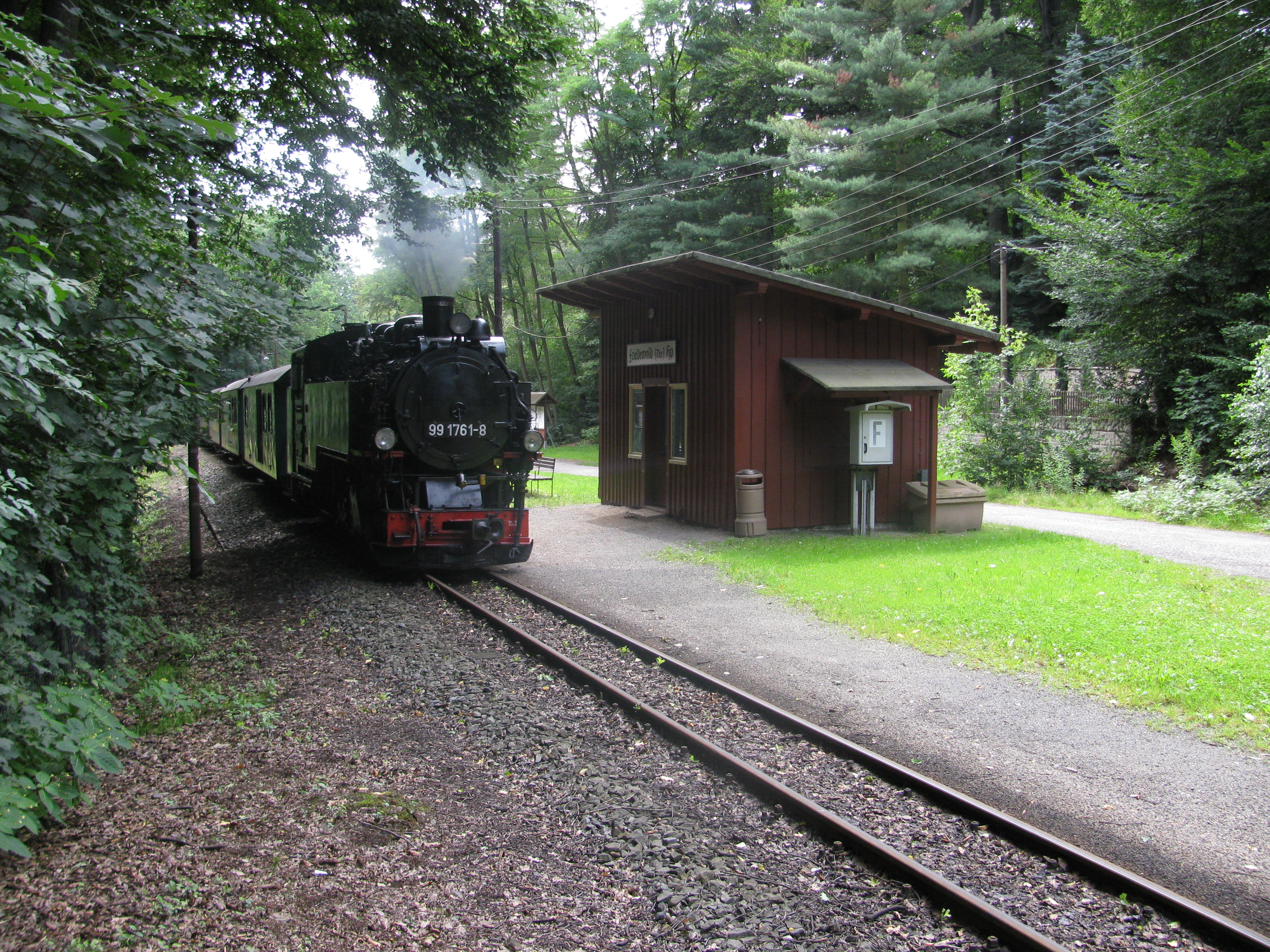 Lößnitzgrundbahn am Haltepunkt Friedewald, Moritzburg, Sachsen